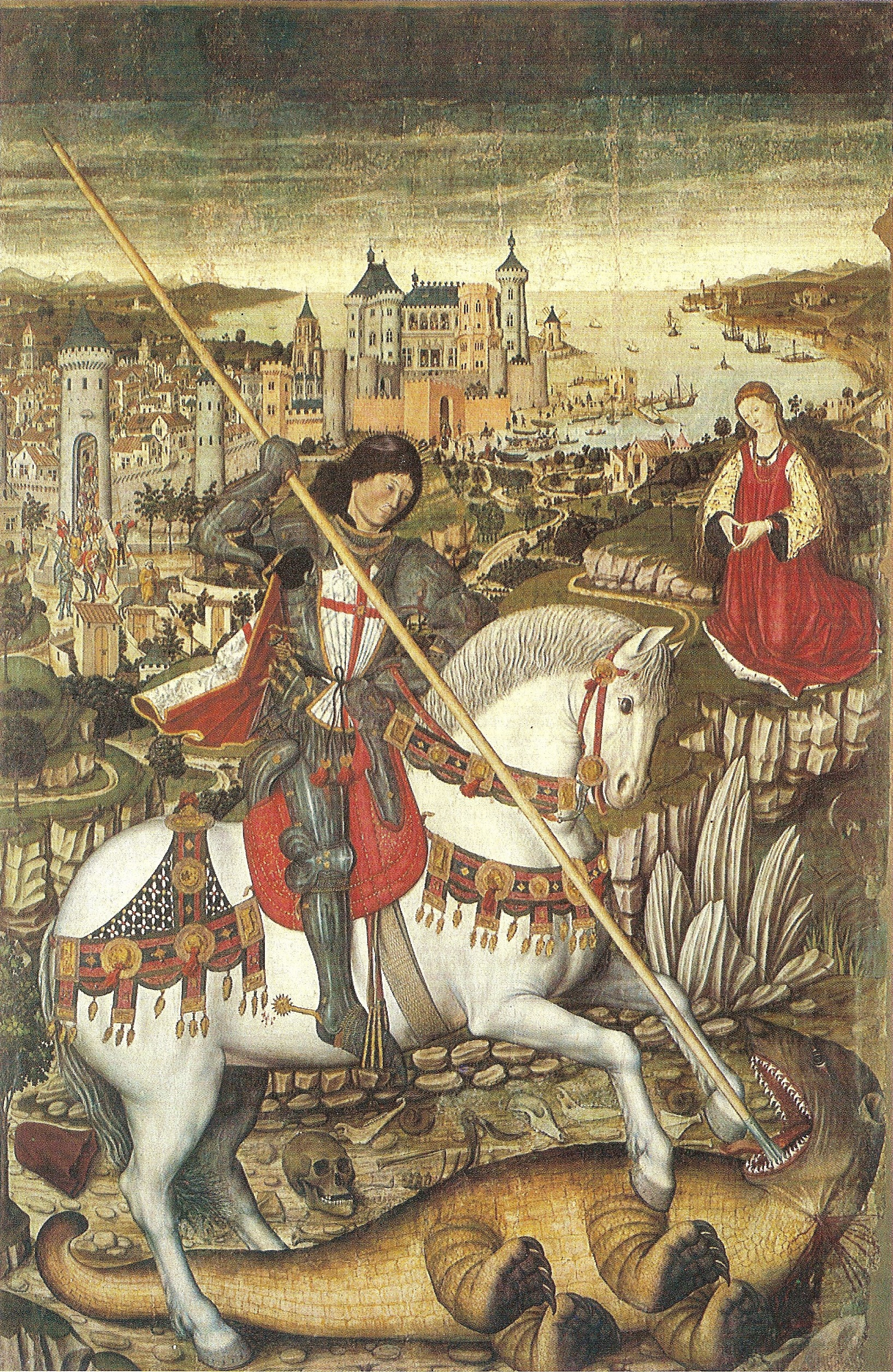 Retaule de Sant Jordi de Pere Niçard. Museu Diocesa de Mallorca. En primer pla Sant Jordi matant el drac, en segon pla la princesa i al fons la Ciutat de Mallorca i la badia